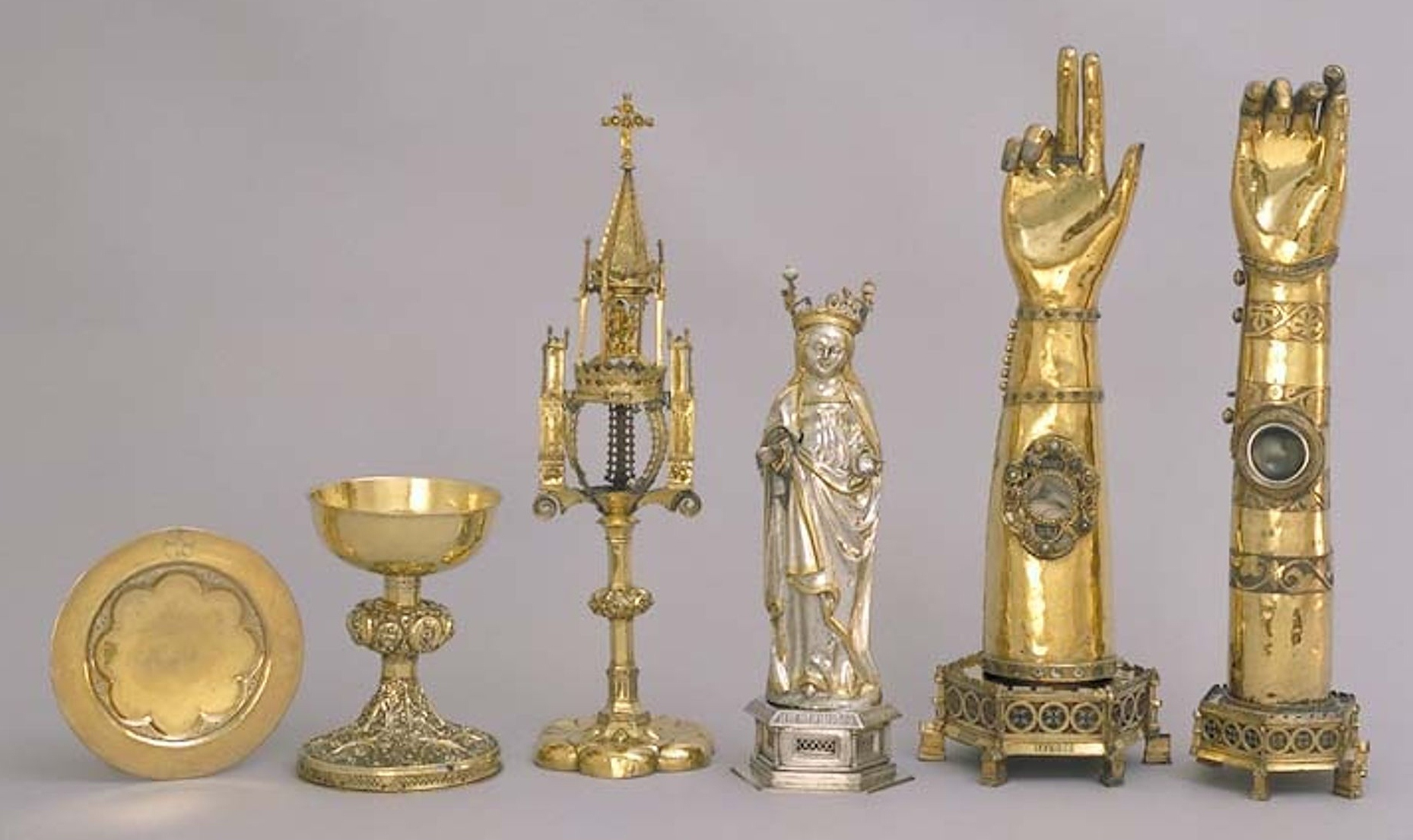 Linköpingsskatten